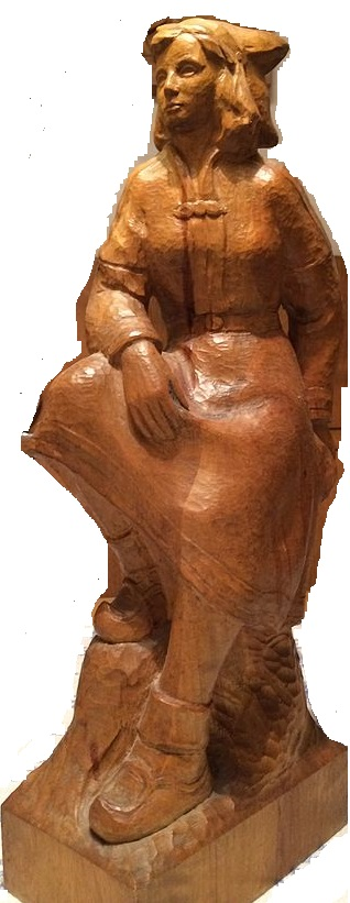 Lappin auf Sockel, Holzplastik, Höhe 48 cm, 1948, Bes.: M. Eder